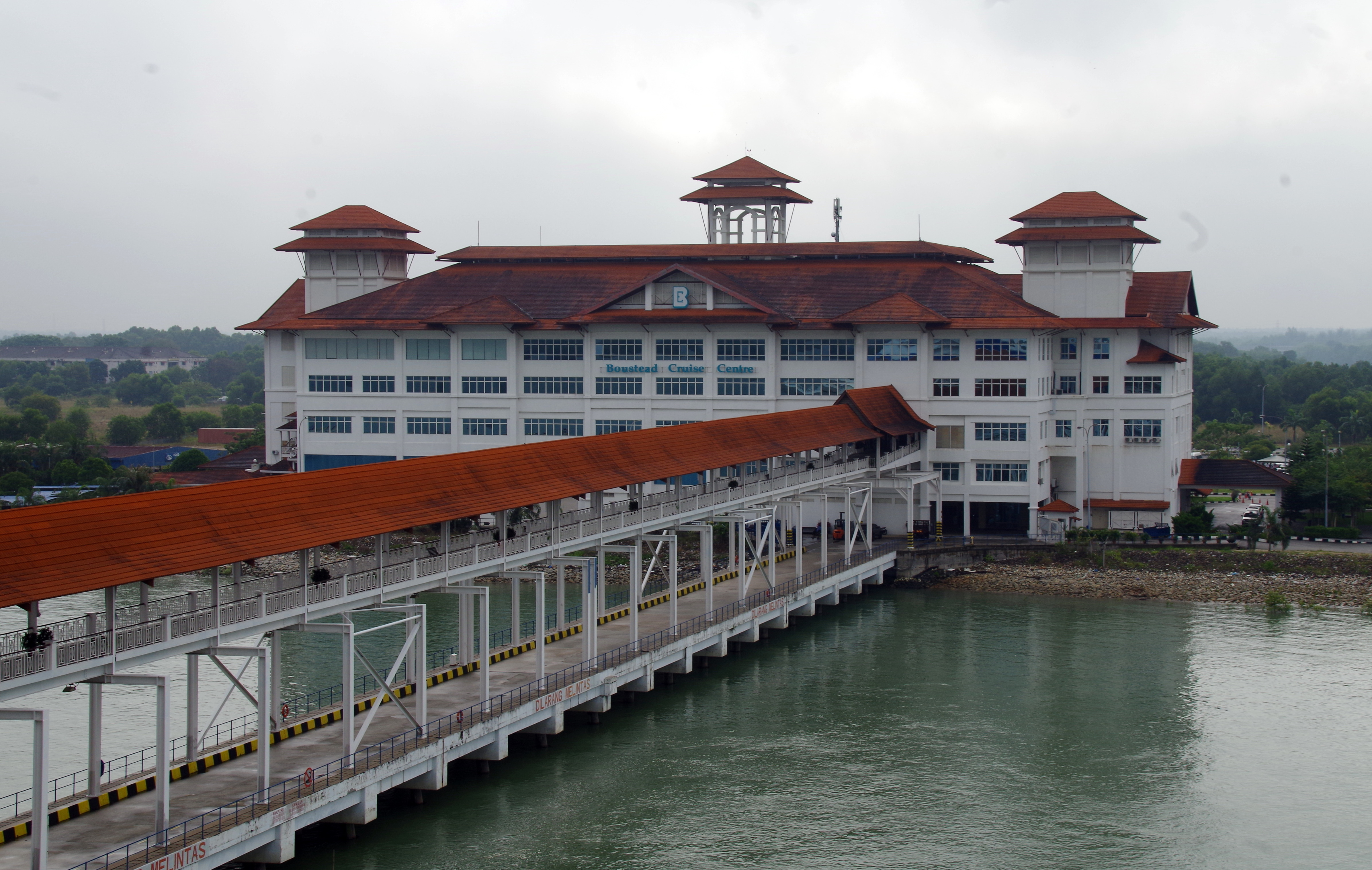 Port Klang Cruise Centre